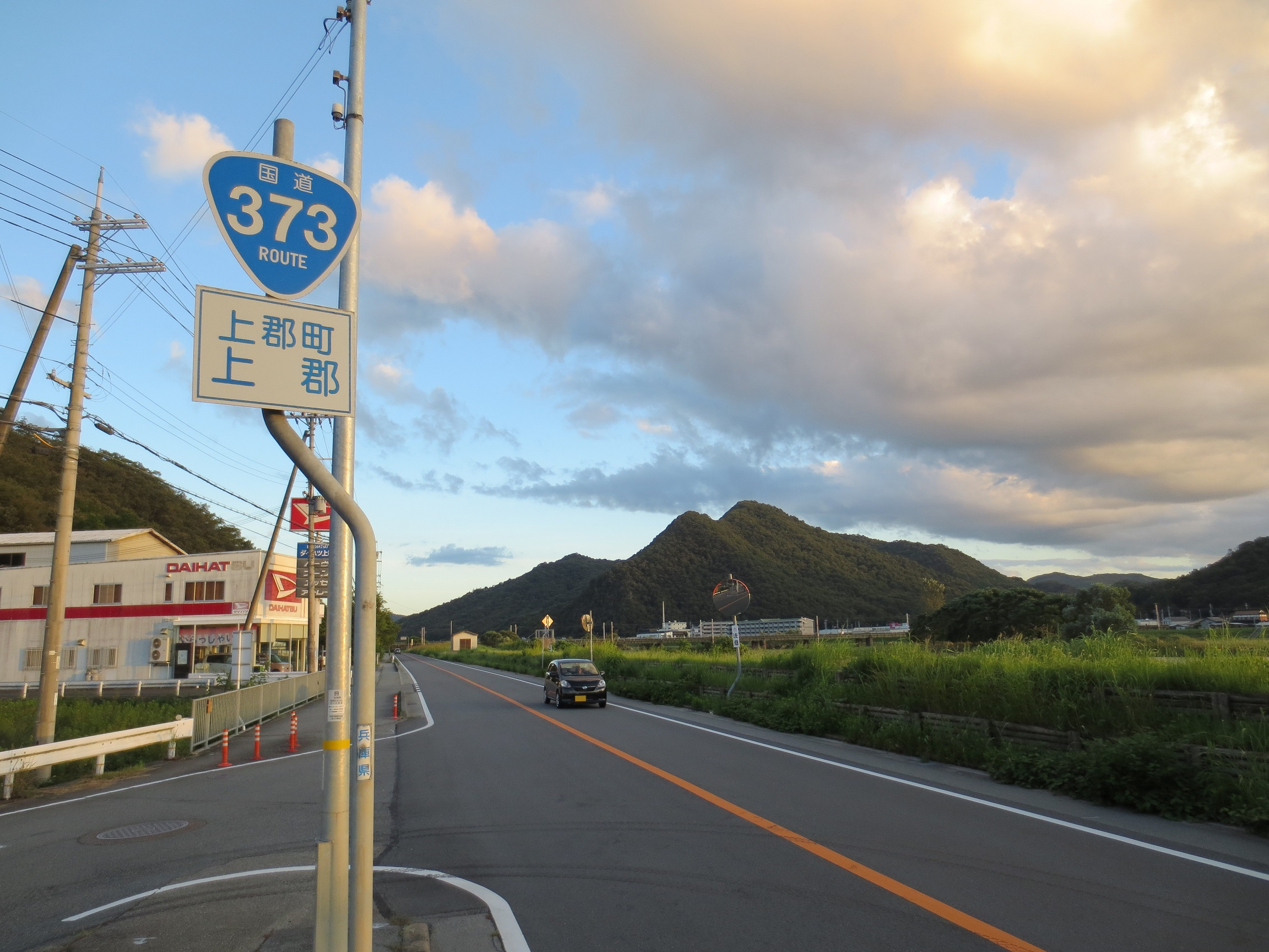 赤穂郡上郡町上郡付近の国道373号。